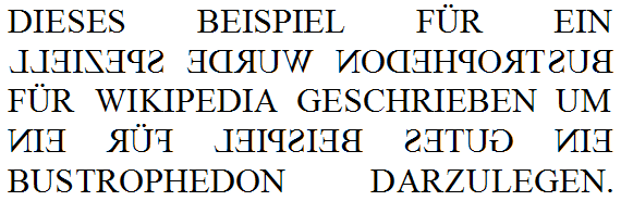 Dies ist ein Beispiel auf Deutsch für ein Bustrophedon.